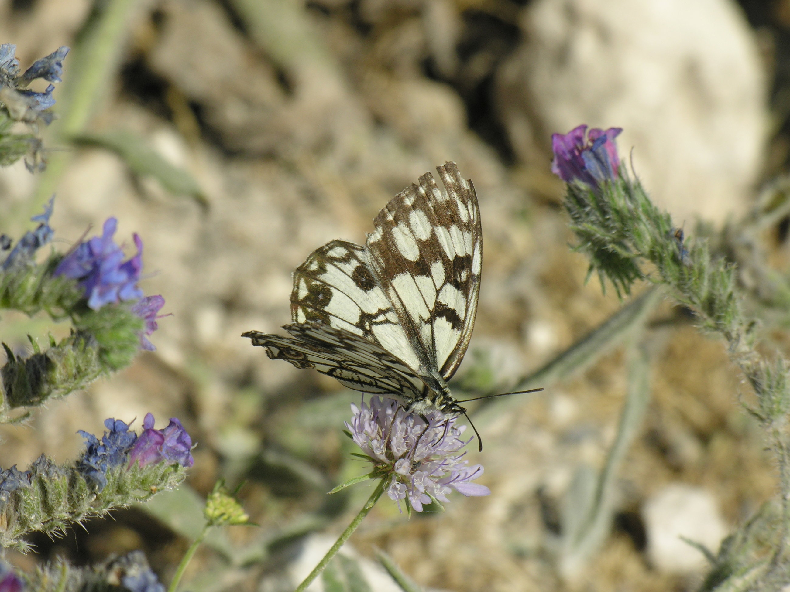 Melanargia ines (Nymphalidae, Satyrinae). Rivas Vaciamadrid, Madrid, España.